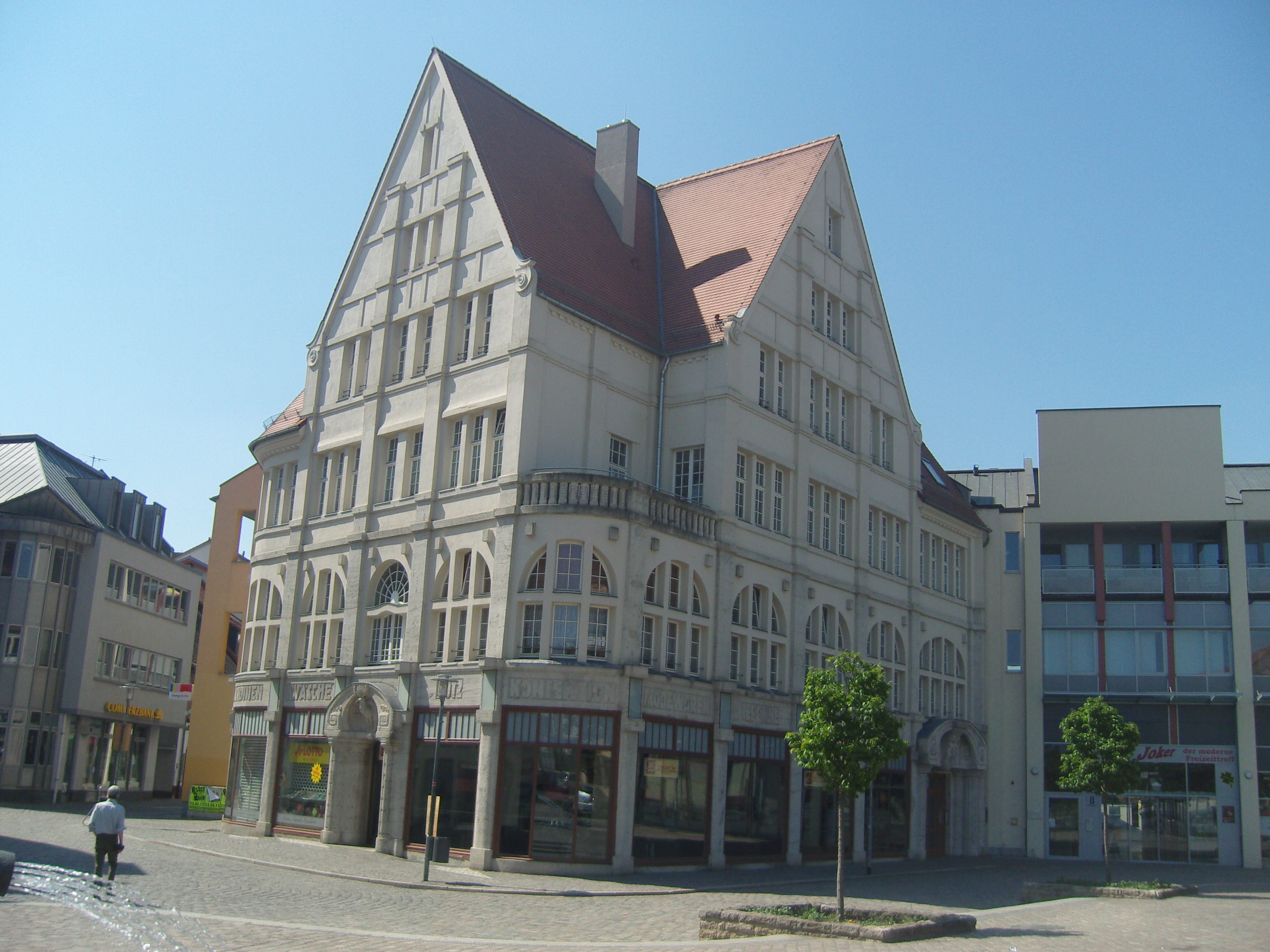 ehem. Kaufhaus Dobkowitz, Entenplan 8, Merseburg, Sachsen-Anhalt; unter Denkmalschutz